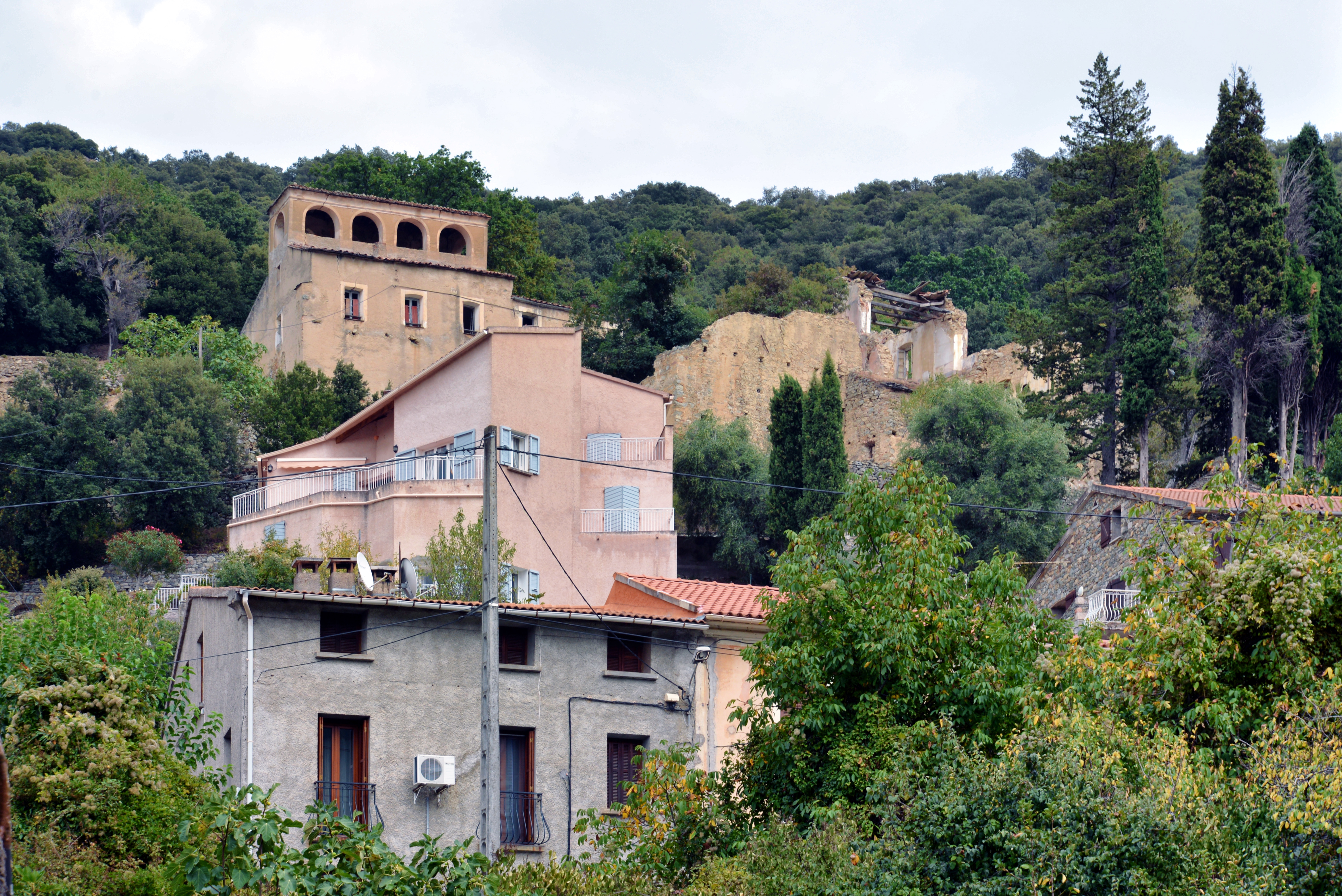 Omessa, Talcini (Corse) - Ancien couvent des Récollets (1624) ruiné, sur les hauteurs du village